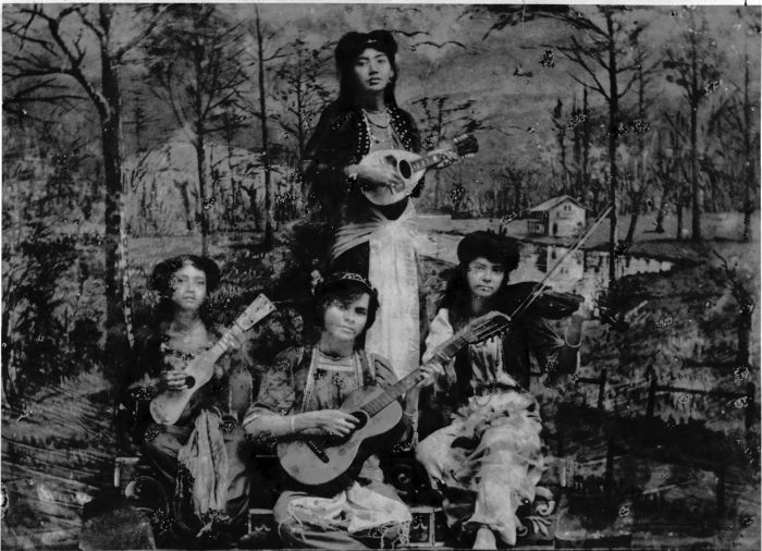 foto. Staande Marie Oord, zittend v.l.n.r.: Mw. Snellaers, Theo MacLennan, Nellie Houtzagers. Door een voortdurend tekort aan artiesten, moesten mannen vaak vrouwenrollen vervullen en omgekeerd. Kemedie Stamboel is een Indische opera die oosterse en westerse elementen combineert. Een Euraziatisch damesorkest met strijkinstrumenten gesitueerd tegen een geschilderd bos landschap